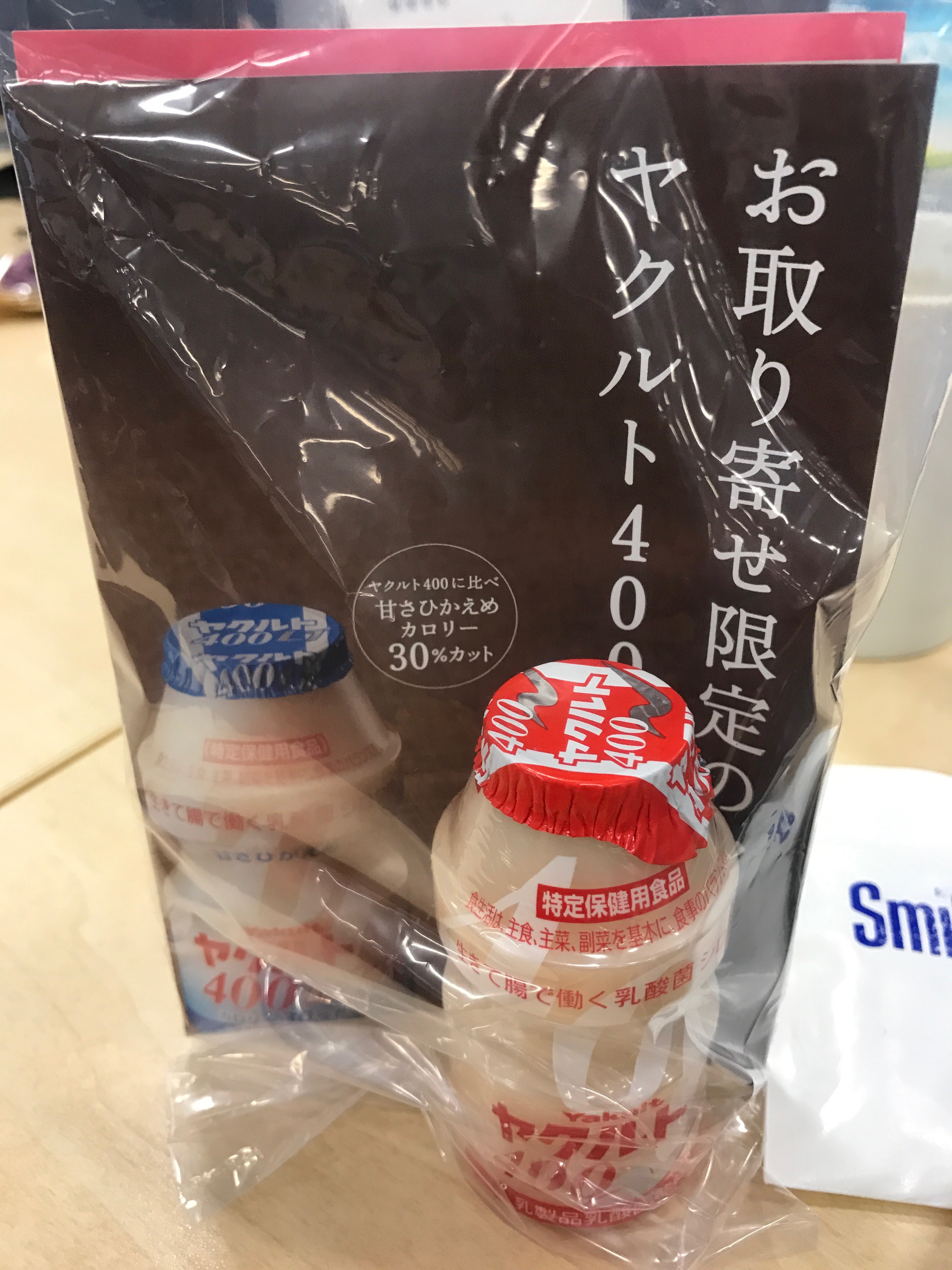 なんか、お店じゃ売ってないらしい。